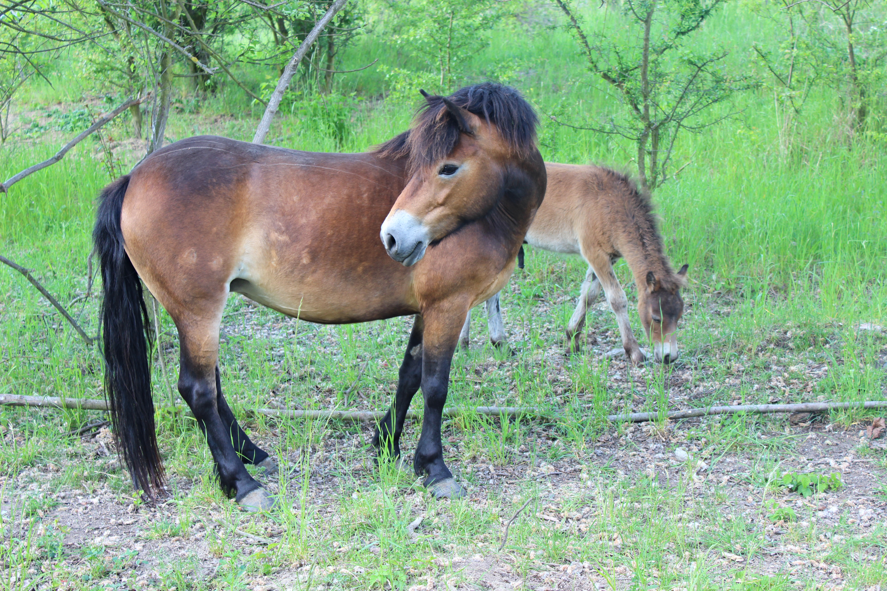 Klisna a hříbě exmoorského pony v přírodní rezervaci Milovice.